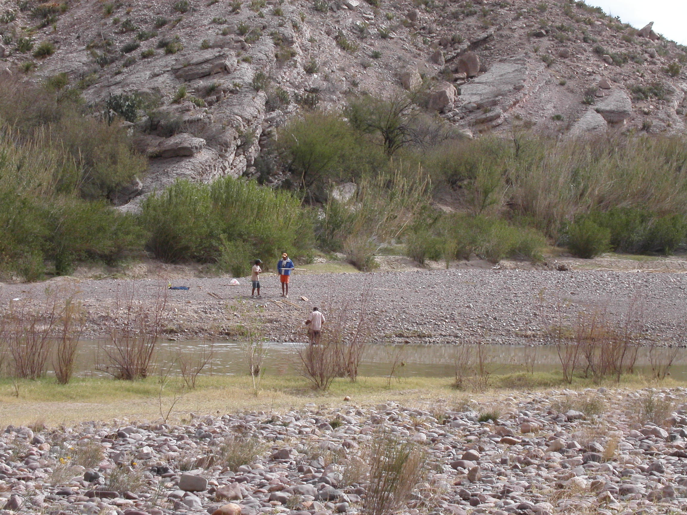 Mexicains passant le Río Grande face au Big Bend National Park. Auteur : Marc Mongenet Date : hiver 2003